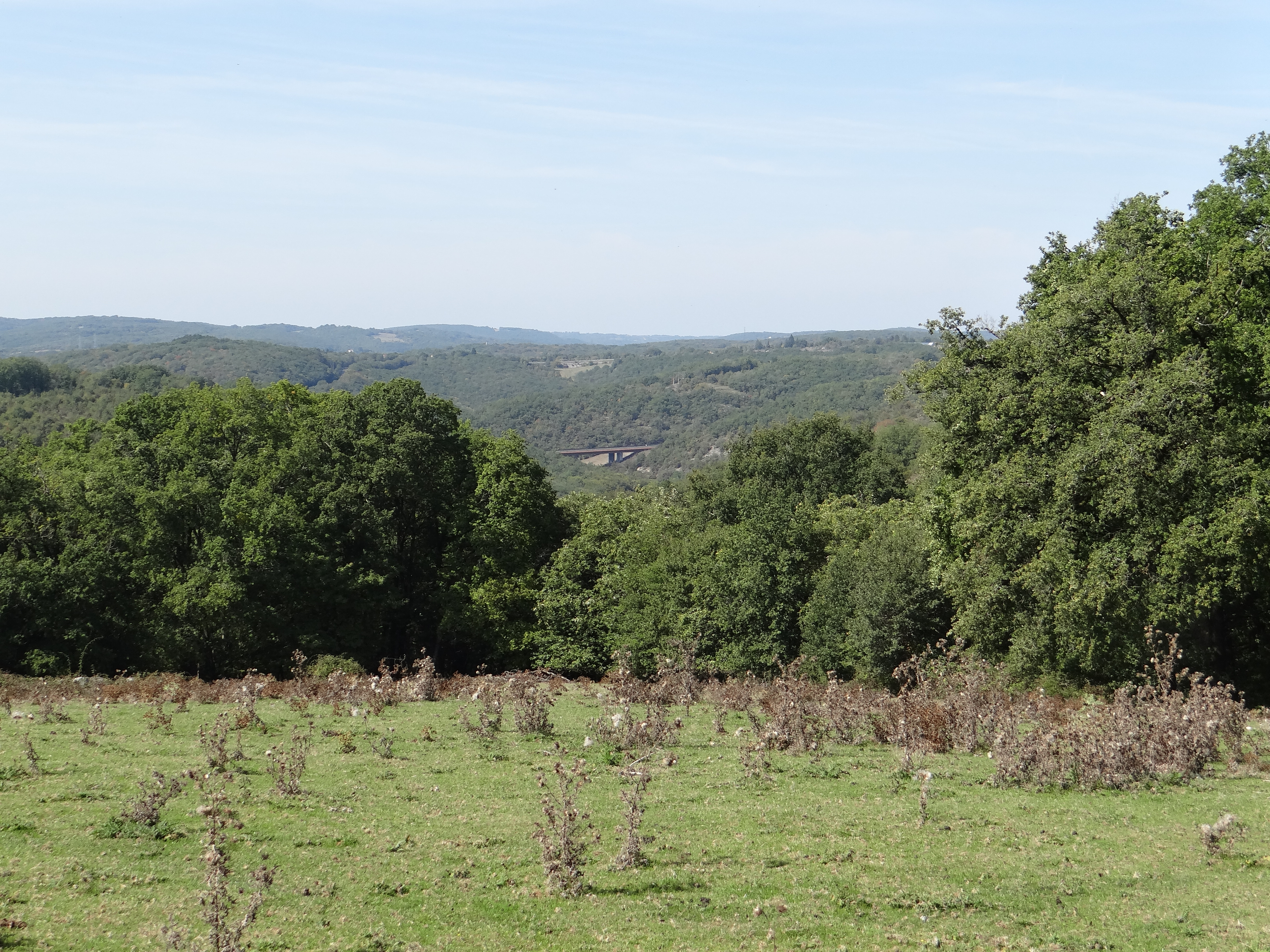 Vue à l'ouest depuis la Motte féodale en 2017, Souillac (Lot, France)